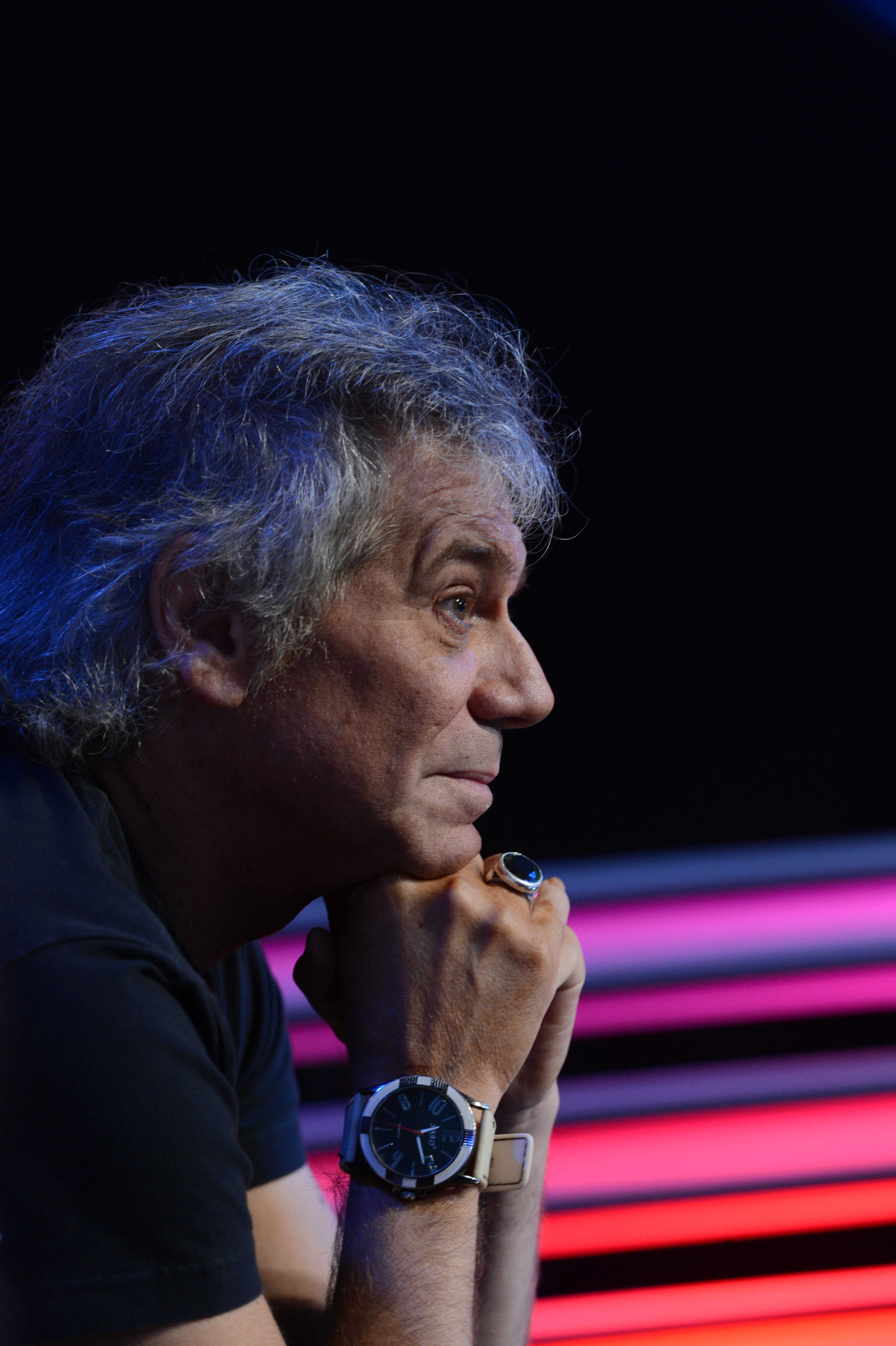 El periodista y conductor argentino, Beto Casella.